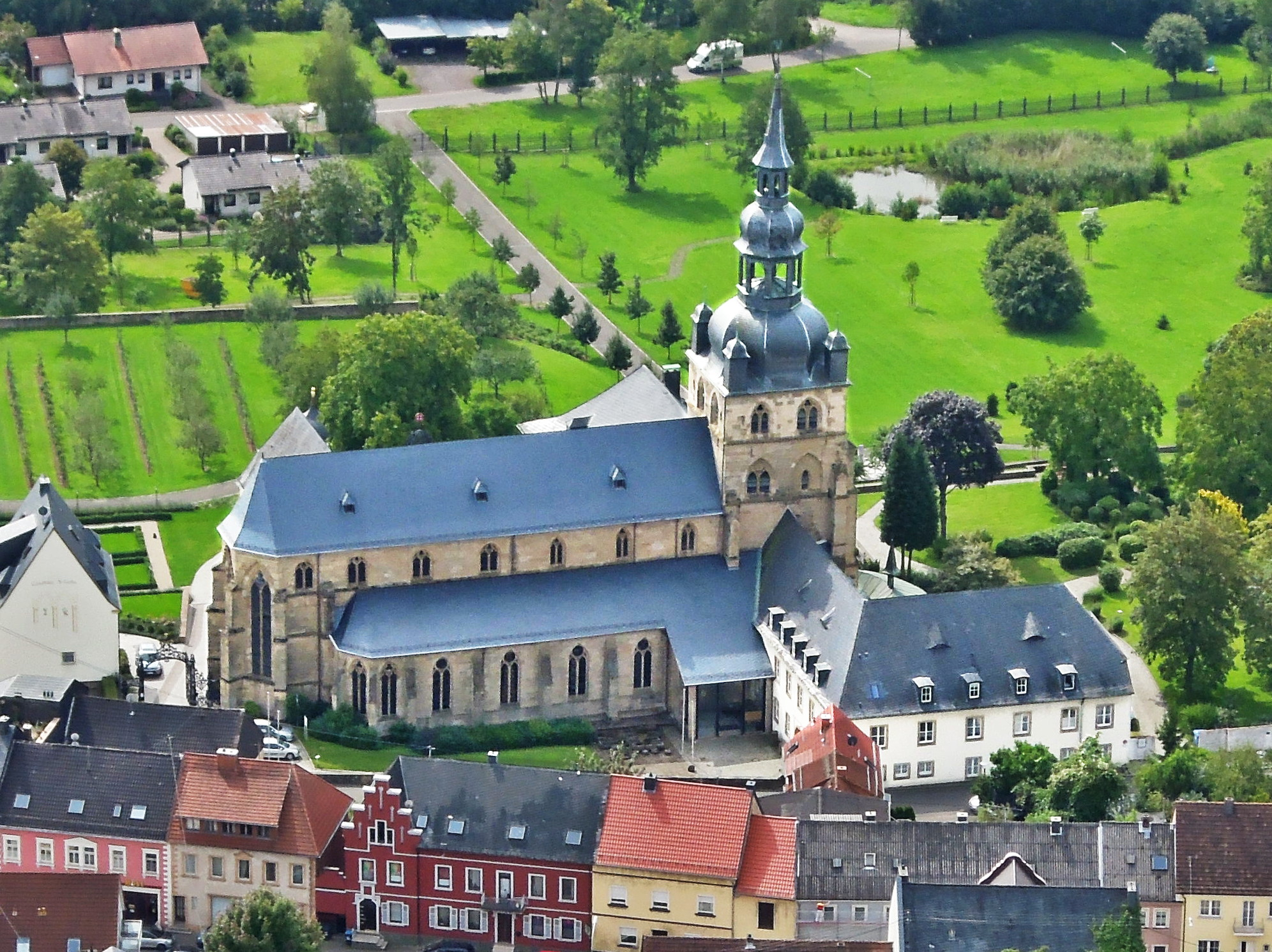 Blick von der Aussichtsplattform auf die Kirche